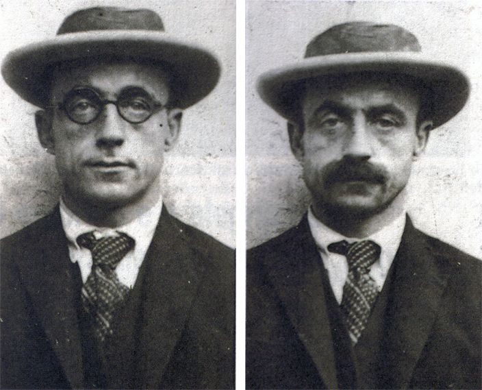 Gino Amleto Meneghetti, criminoso italiano radicado no Brasil